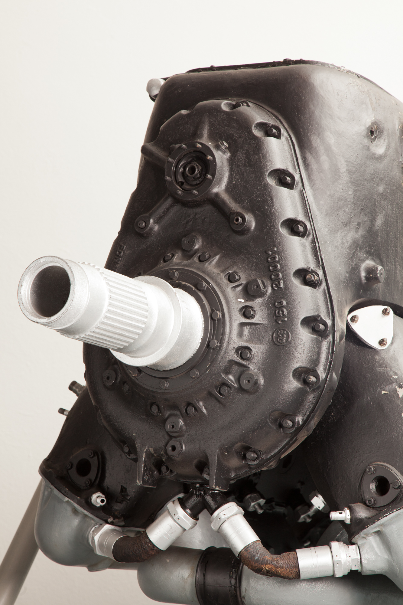 Motore Alfa Romeo RA1000 esposto al Museo nazionale della scienza e della tecnologia Leonardo da Vinci di Milano.